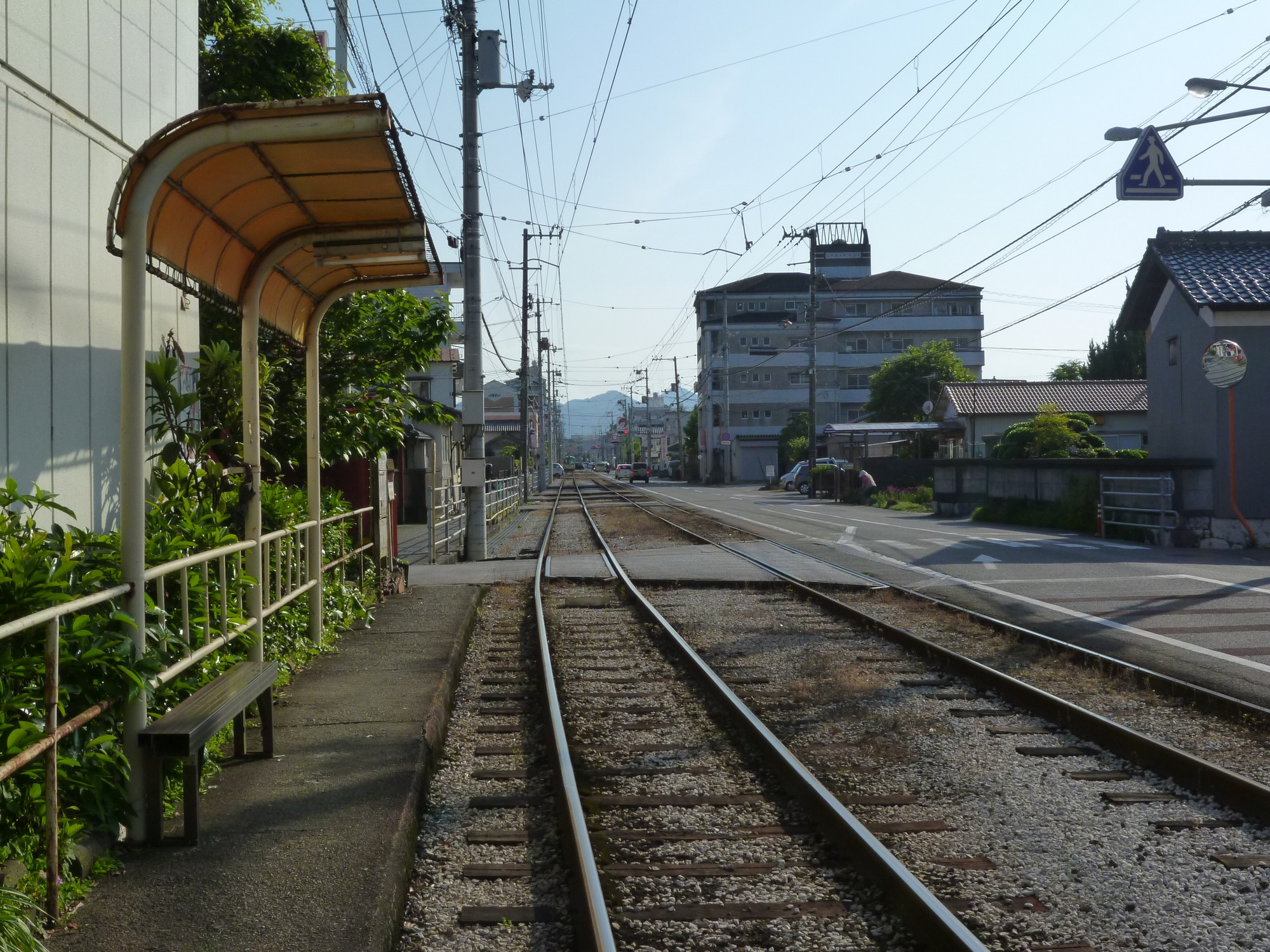 2015年5月8日撮影。